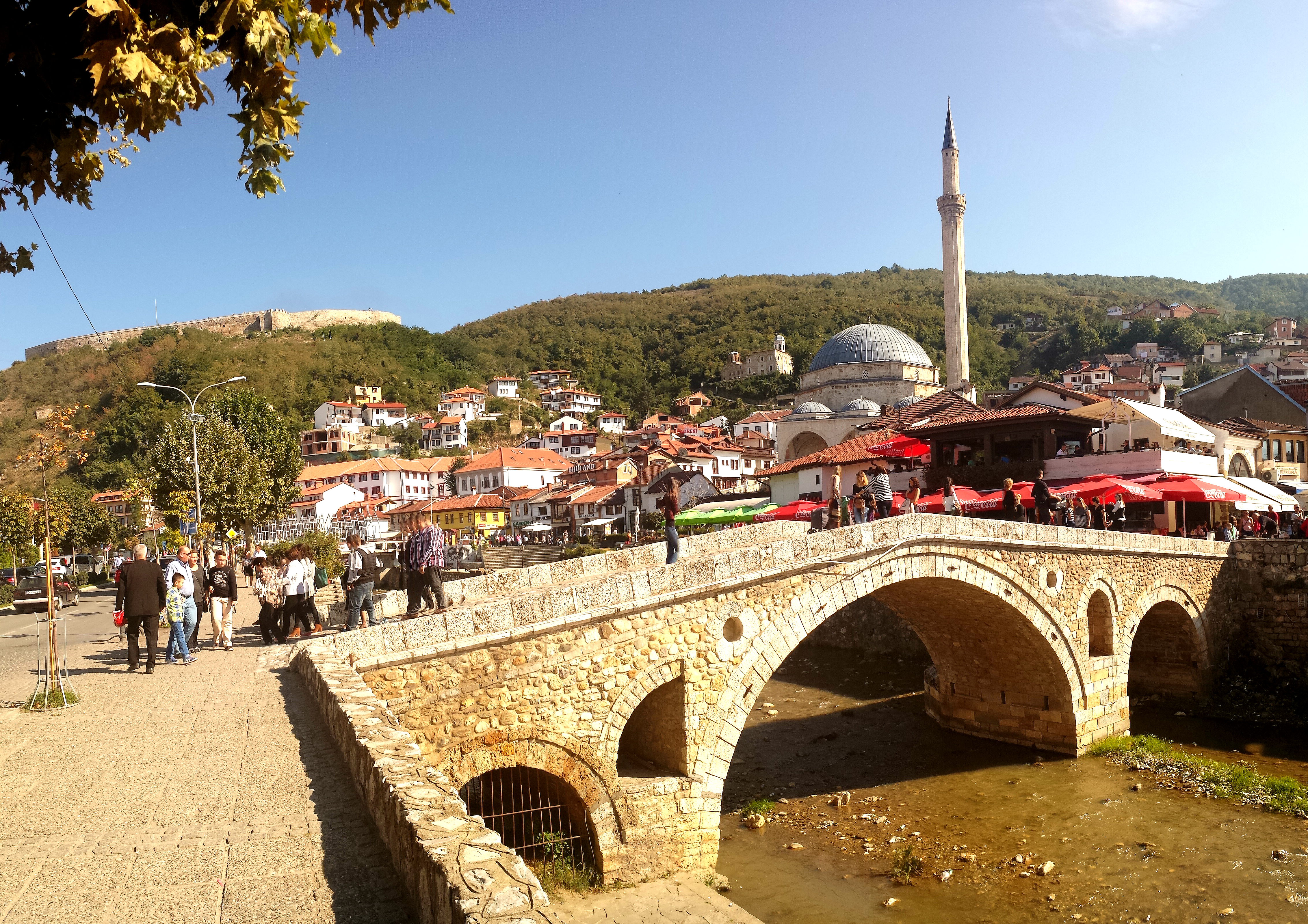 Qendra historike e Prizrenit